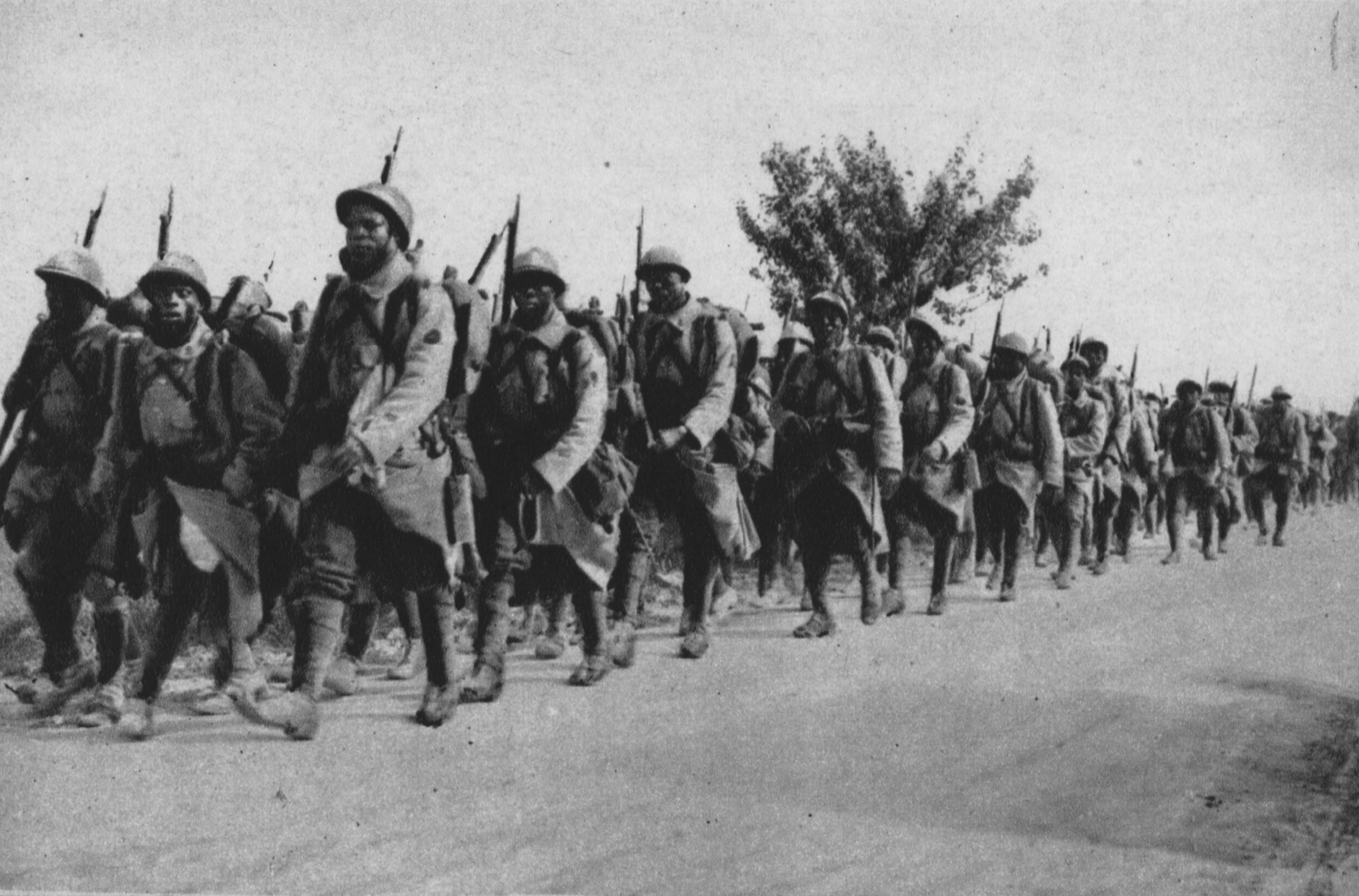 Senegalschützen begeben sich in Eilmärschen nach Verdun (23. Juli 1916).